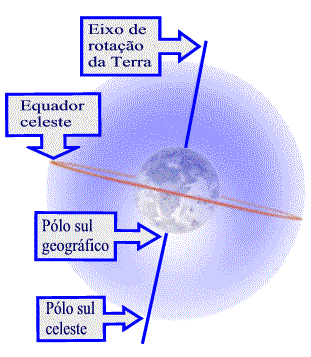 Celestial pole